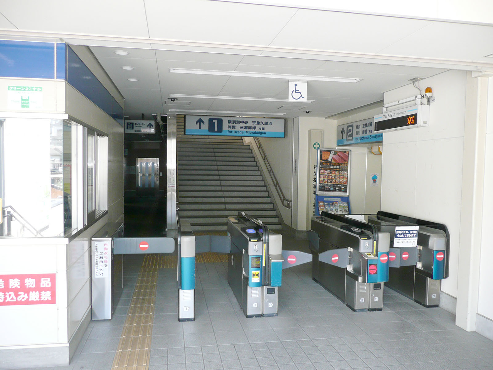 安針塚駅改札口